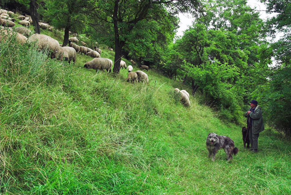 Schafherde im Hessischen